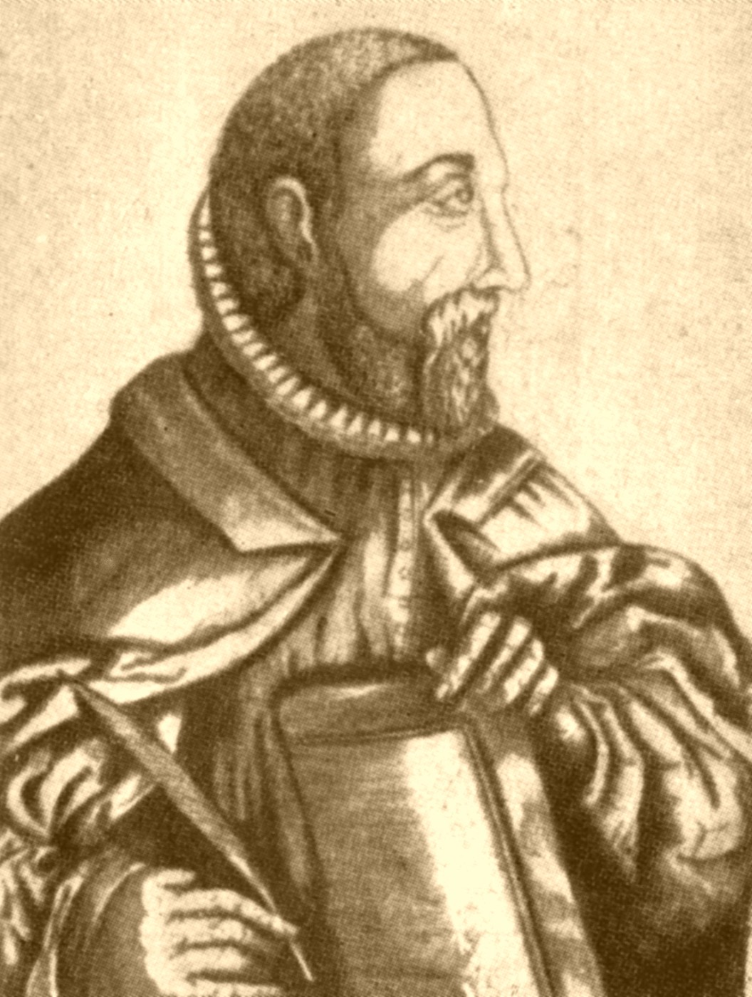 O escritor português João de Barros